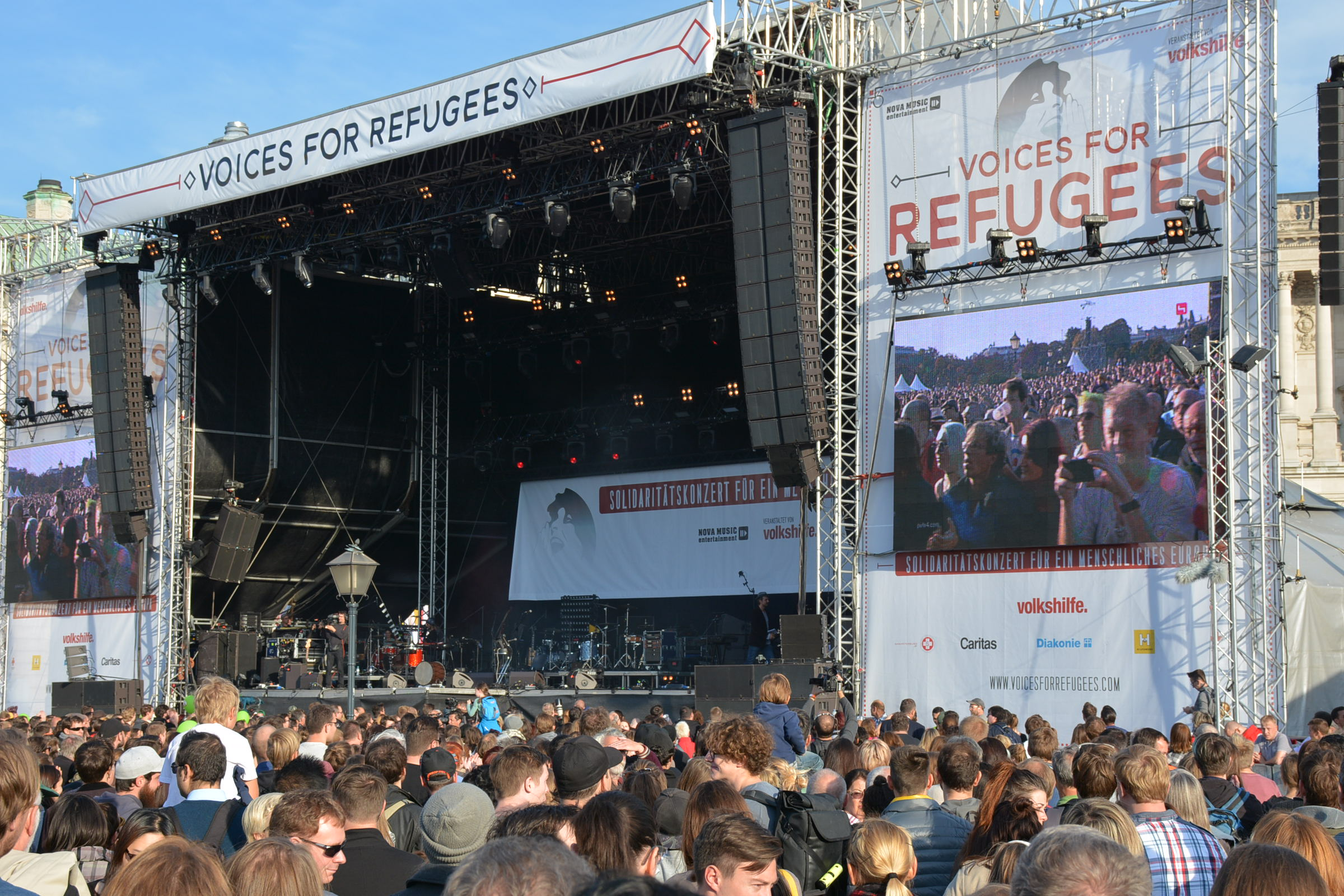 Solidaritätskonzert "Voices for Refugees" am 3.10.2015 am Wiener Heldenplatz